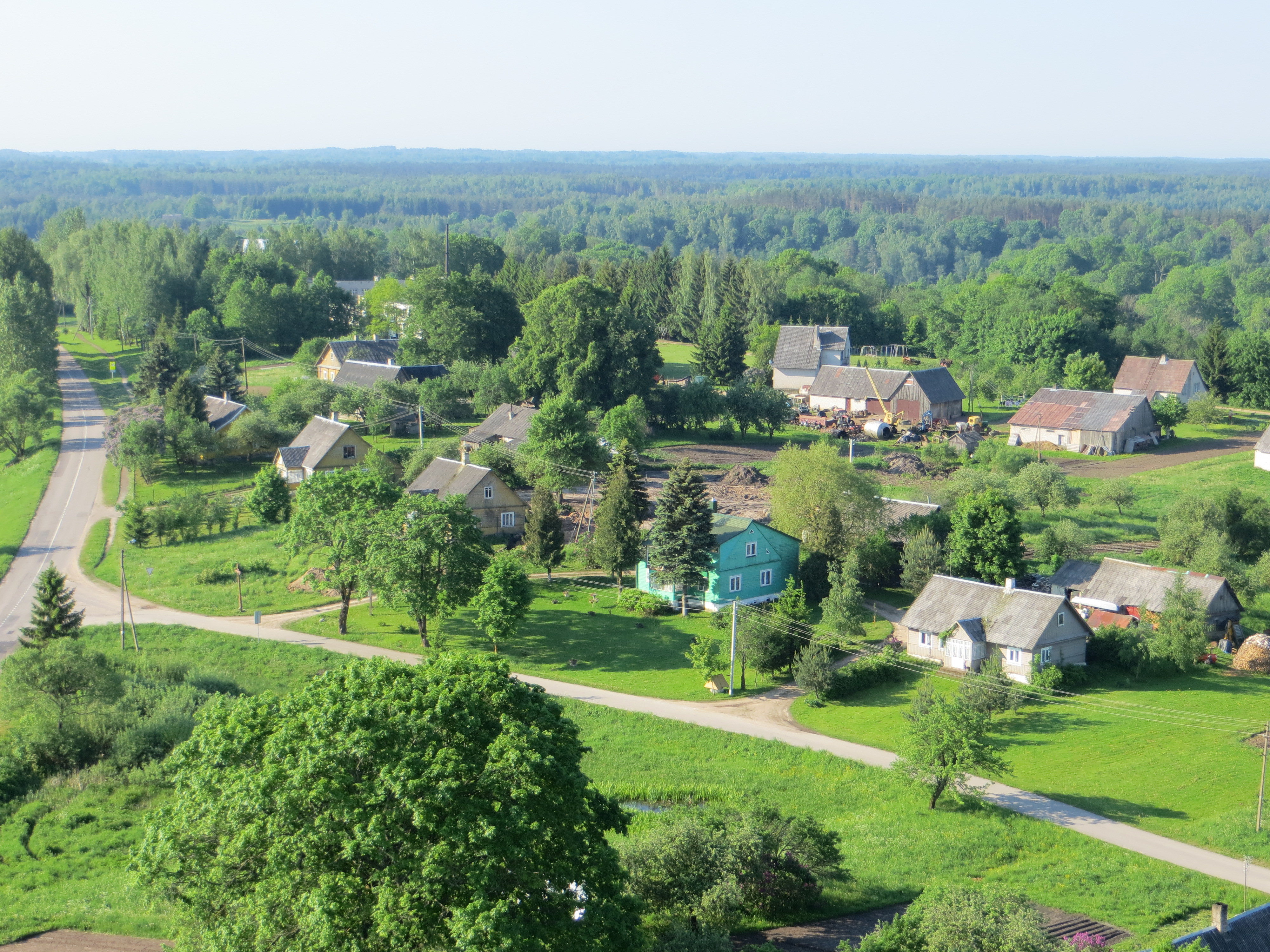 Dubingiai, Lithuania